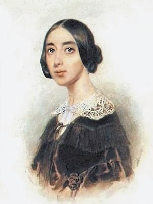 Портрет певицы Полины Виардо. 1830-ые г.г